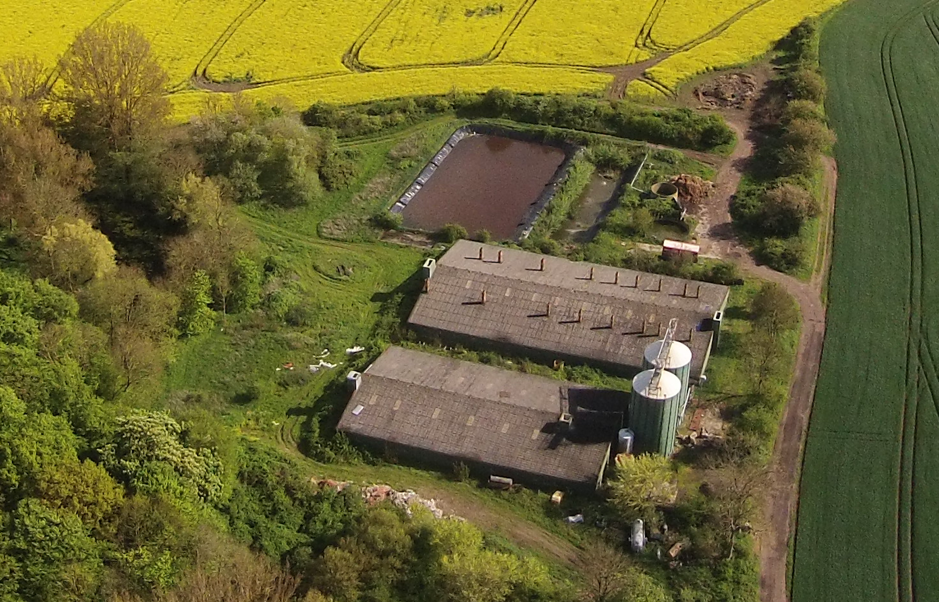 Die 1985 gebaute Schweineaufzuchtanlage mit 2 Stallgebäuden, Futtersilos und Güllebecken